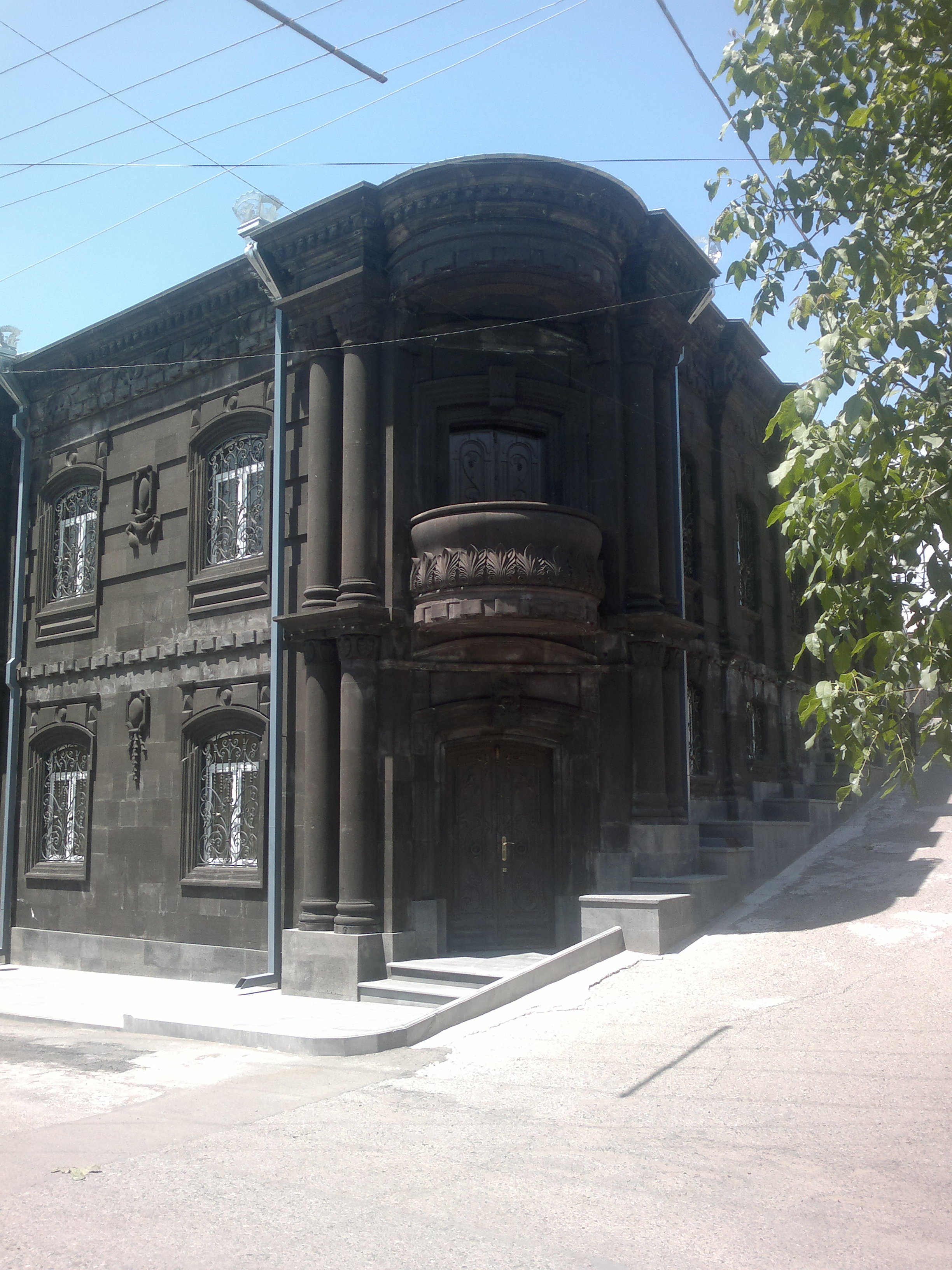 Գյումրվա առանձնատուն